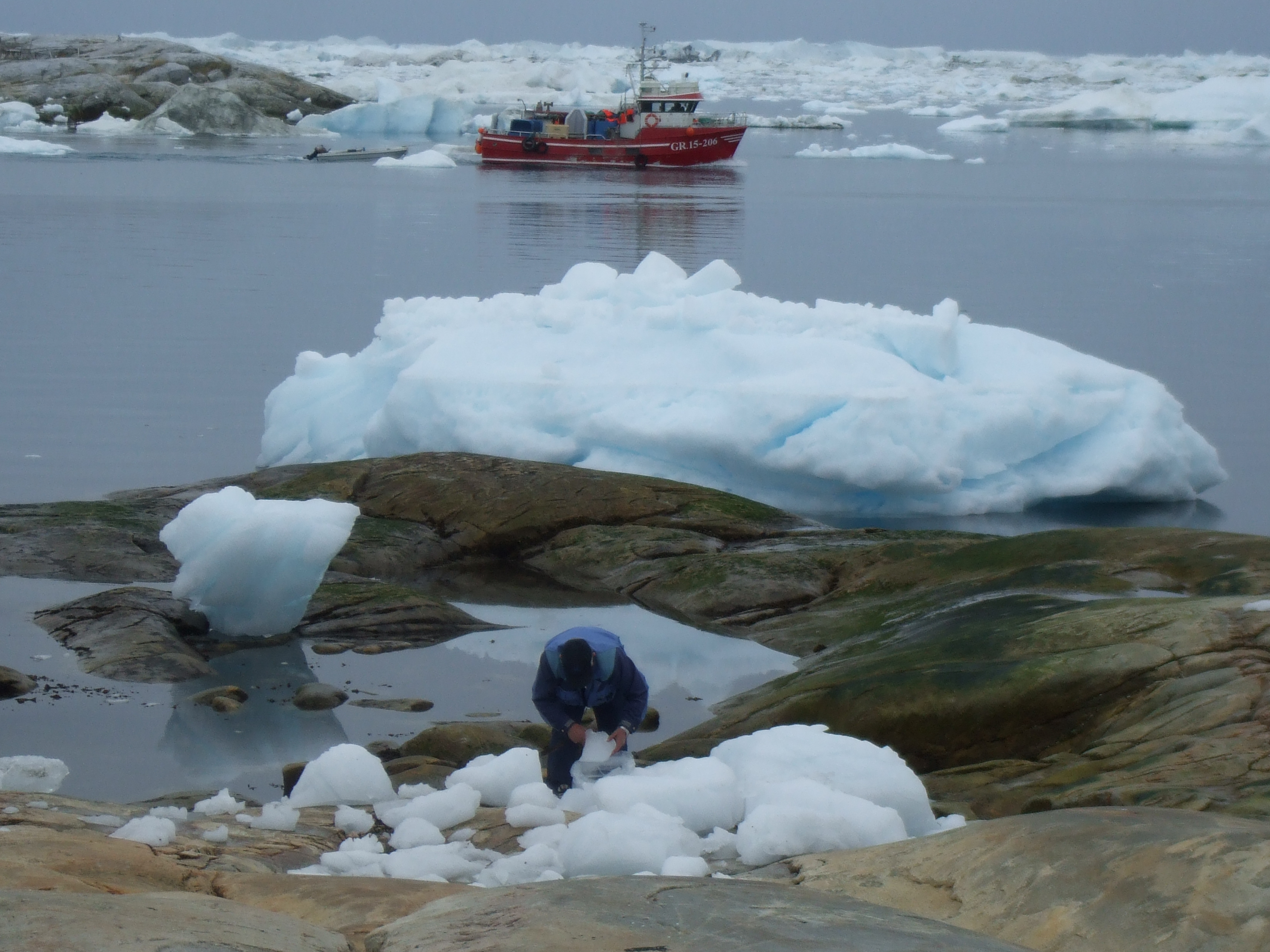 Ilulissat 7 port glaçons qu'à se servir Groenland 2009 Expédition ACarré